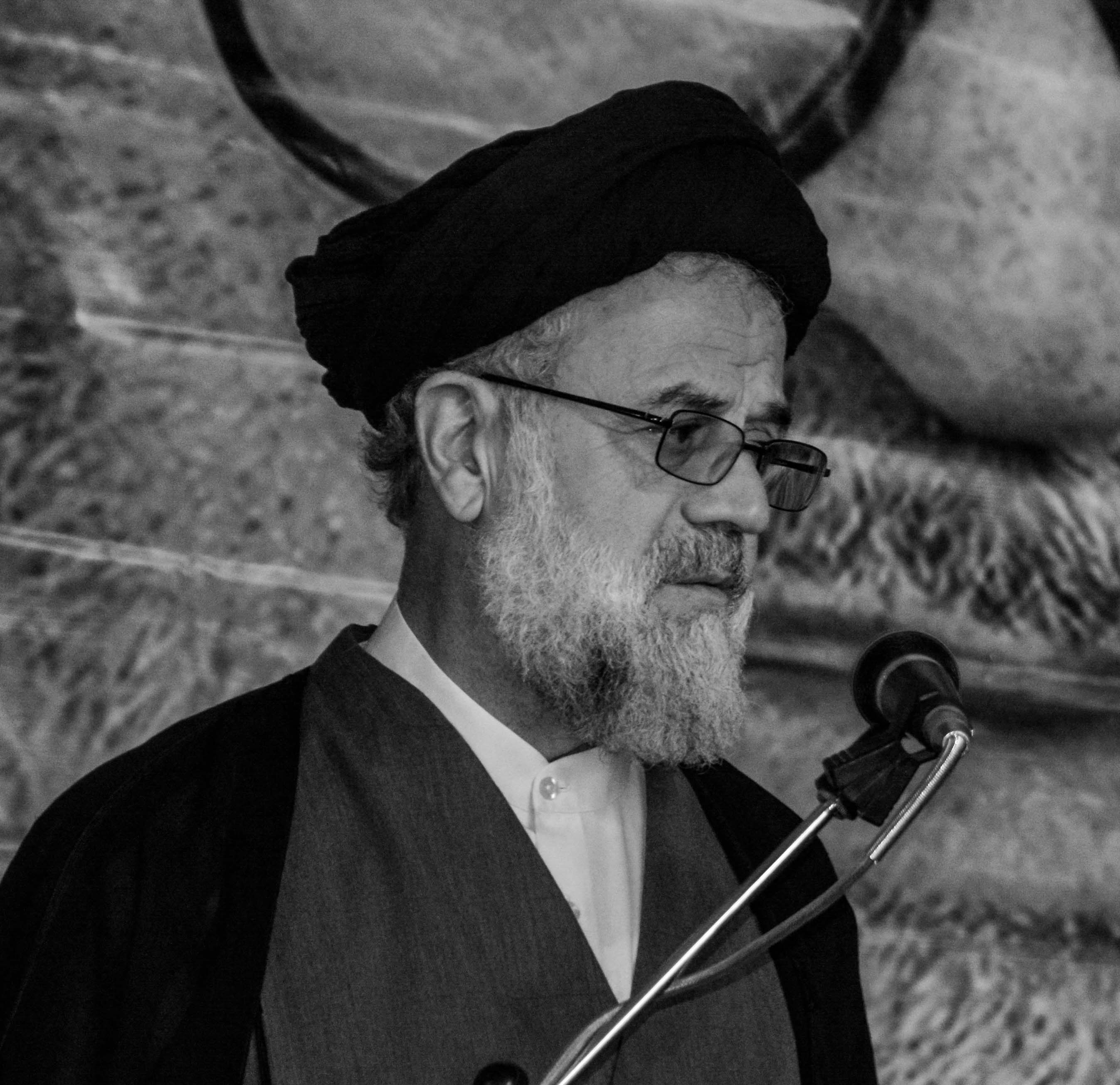 سید حسین موسوی تبریزی در حال سخنرانی در مراسم درگذشت آیت الله منتظری - نجف آباد